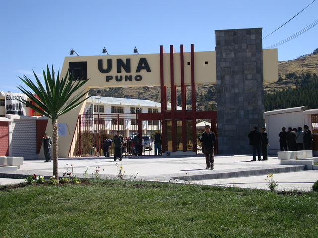 Puerta principl, Ciudad Universitaria de la UNAP (Puno)